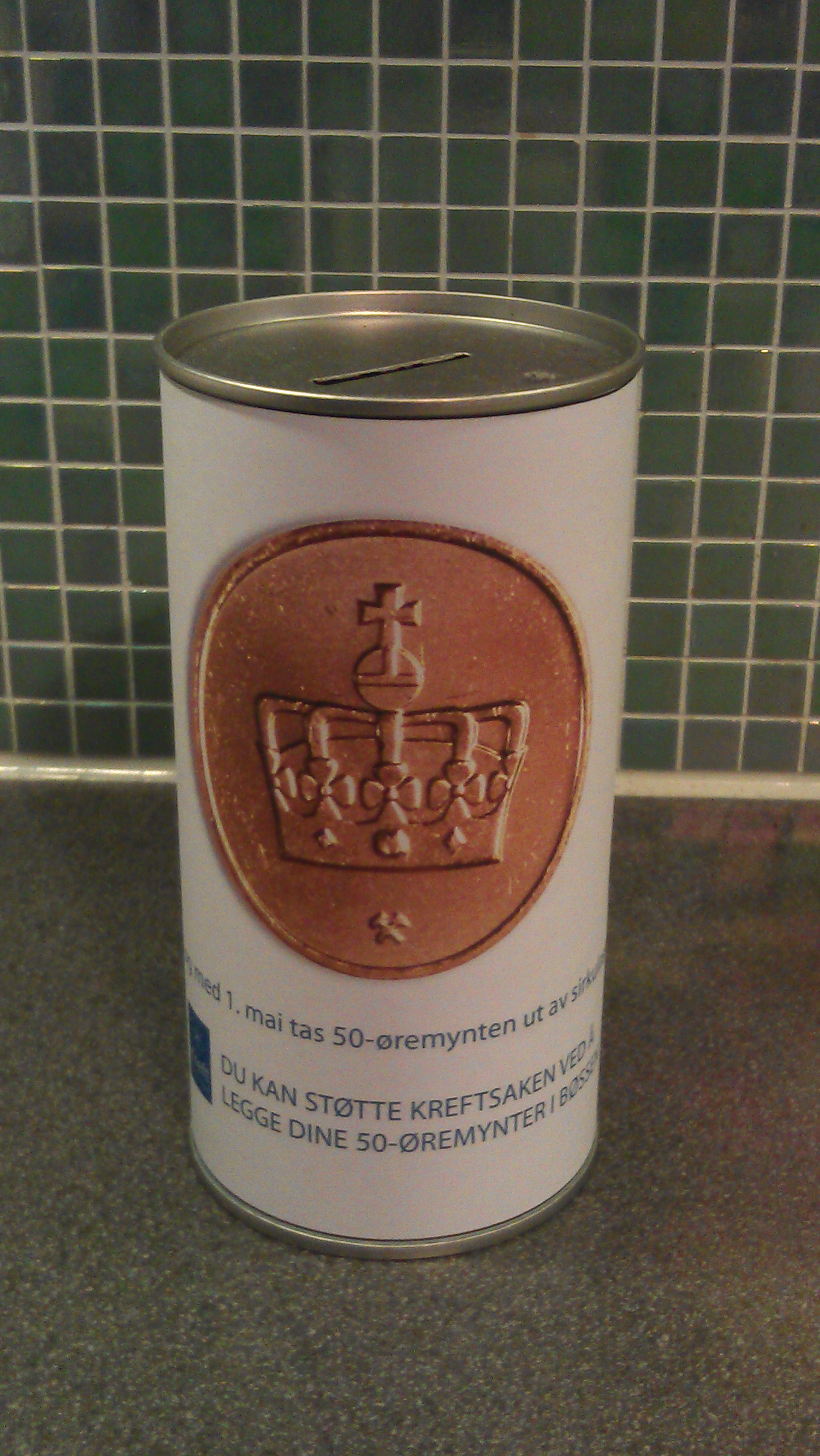 Kreftforeningens innsamlingsaksjon i 2012, ifm at 50-øringen utgår som gyldig betalingsmiddel 1. mai 2012.